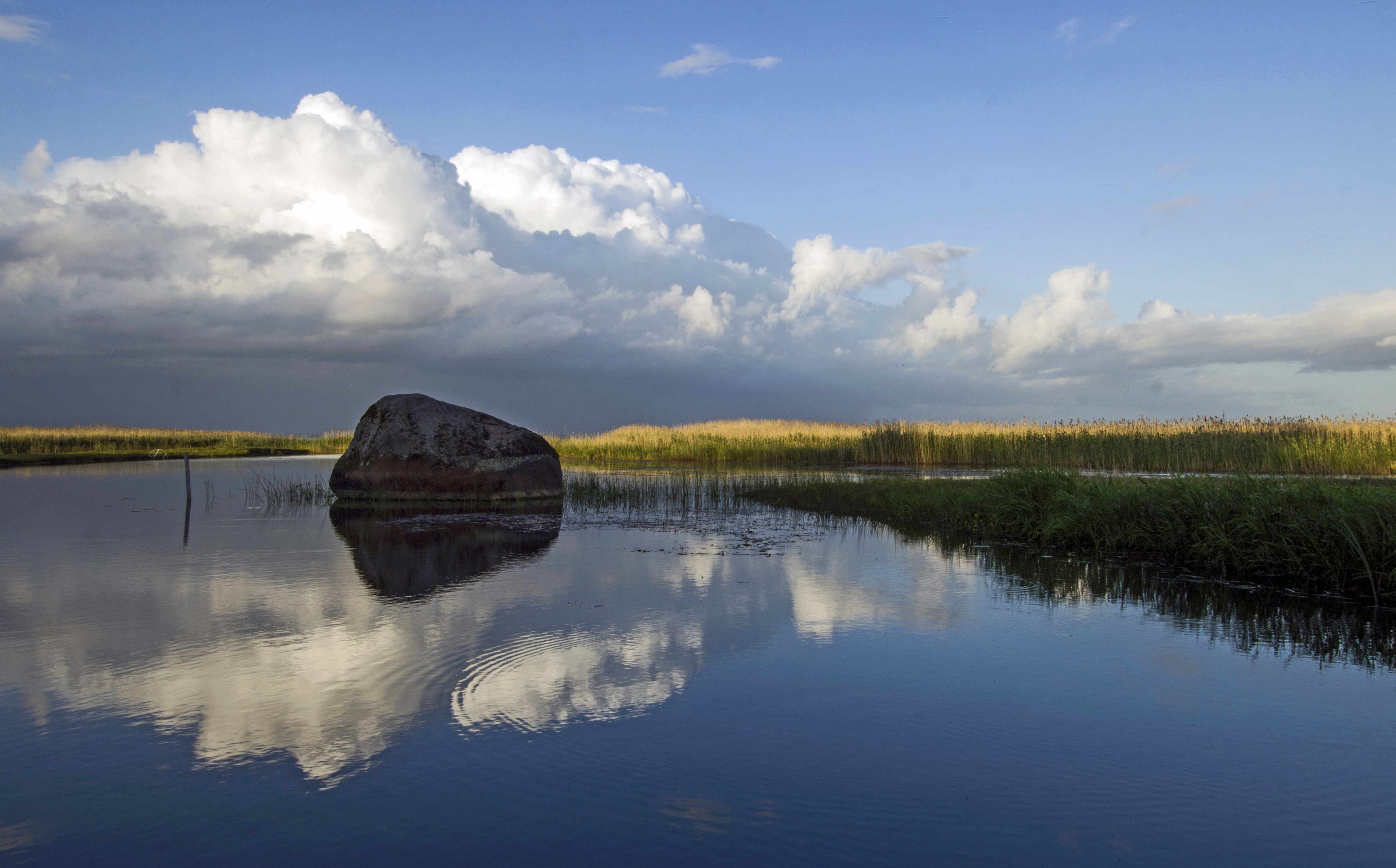 Kalevipoja kivi